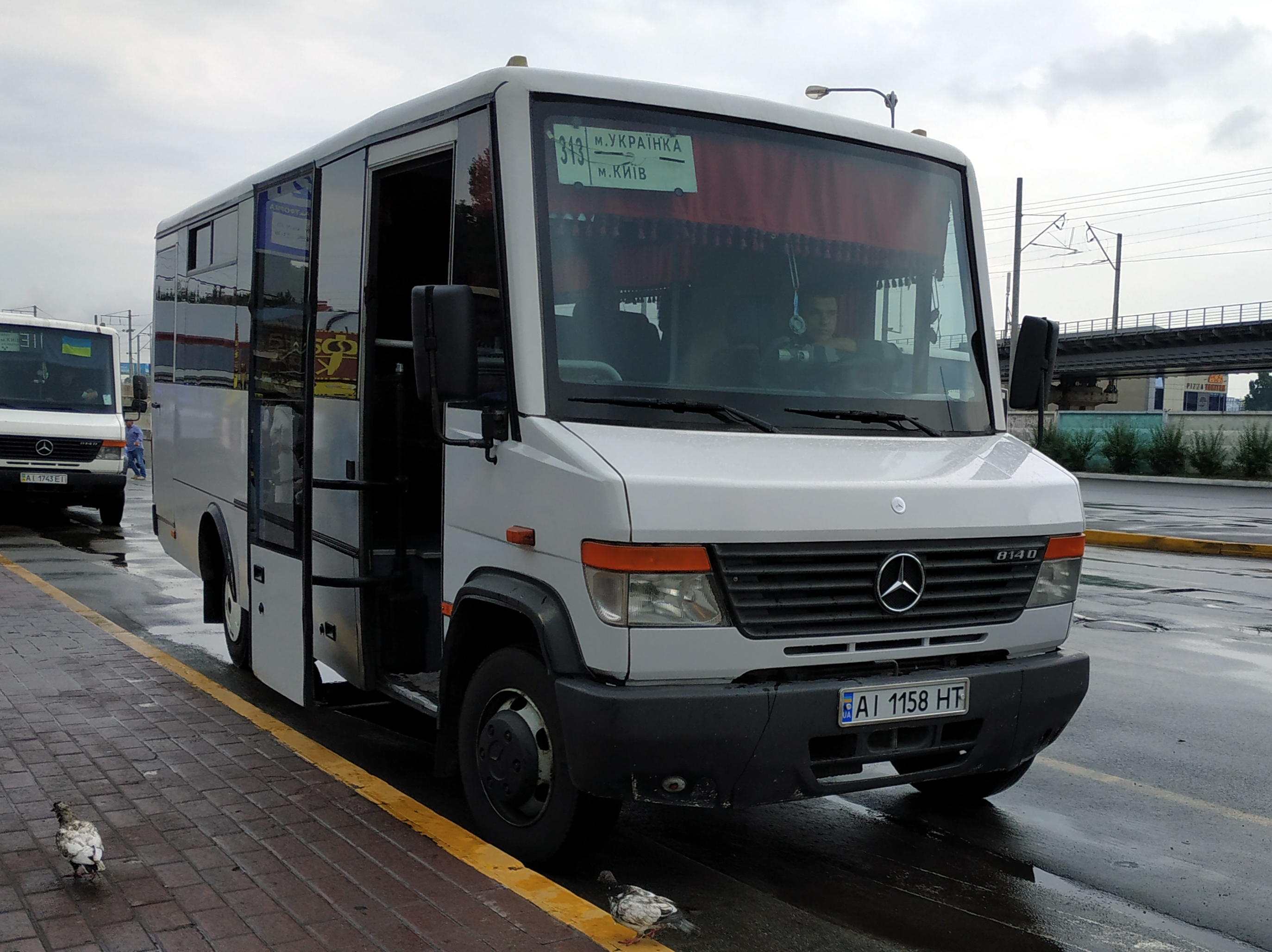 Автобус Стрый-Авто А-07562, Киев, автостанция Выдубичи, 2019 г.